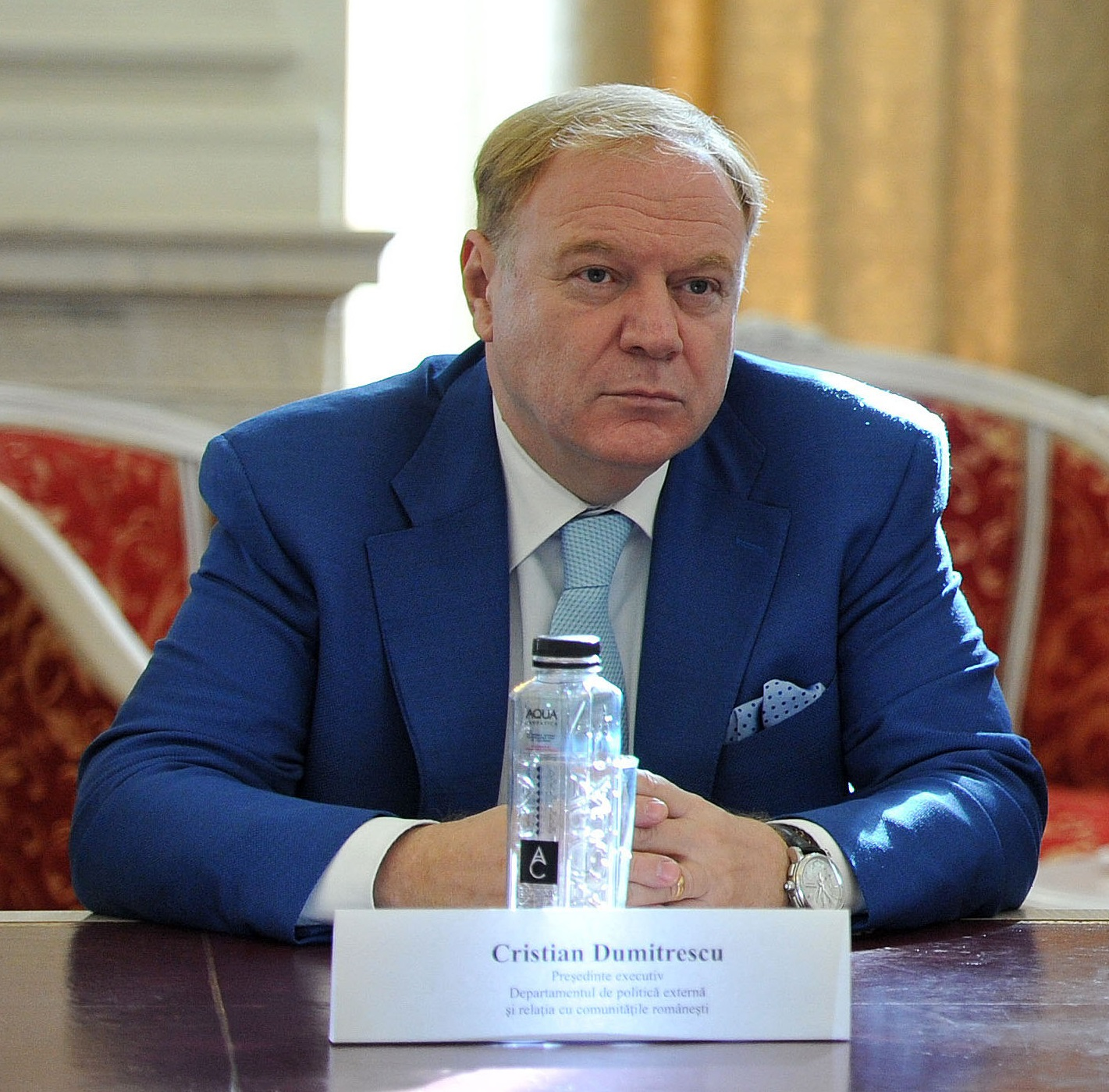 Victor Ponta Victor Ponta, Cristian Dumitrescu si Titus Corlatean la Atelierele Viitorului - Editia a III-a, Palatul Parlamentului